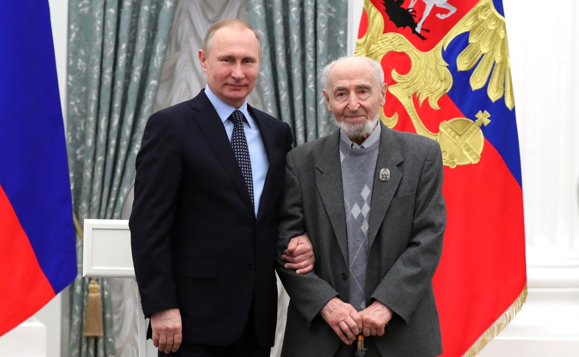 Премии Президента в области литературы и искусства за произведения для детей и юношества 2016 года удостоен художник, режиссёр Леонид Шварцман